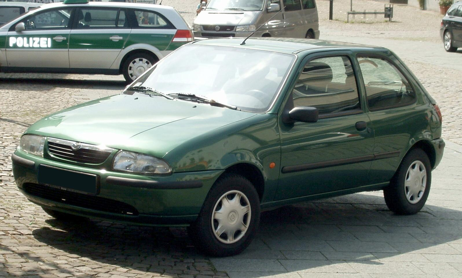 Mazda 121 three-door